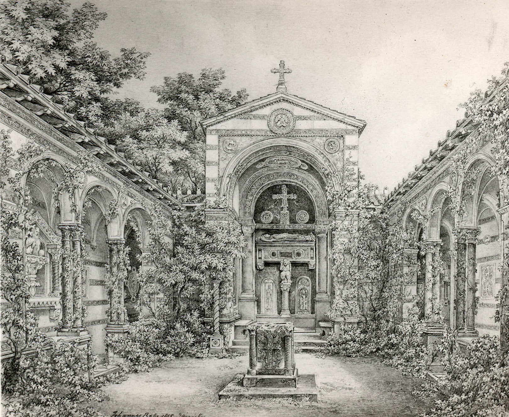 Inneres des Klosterhofs, Zeichnung